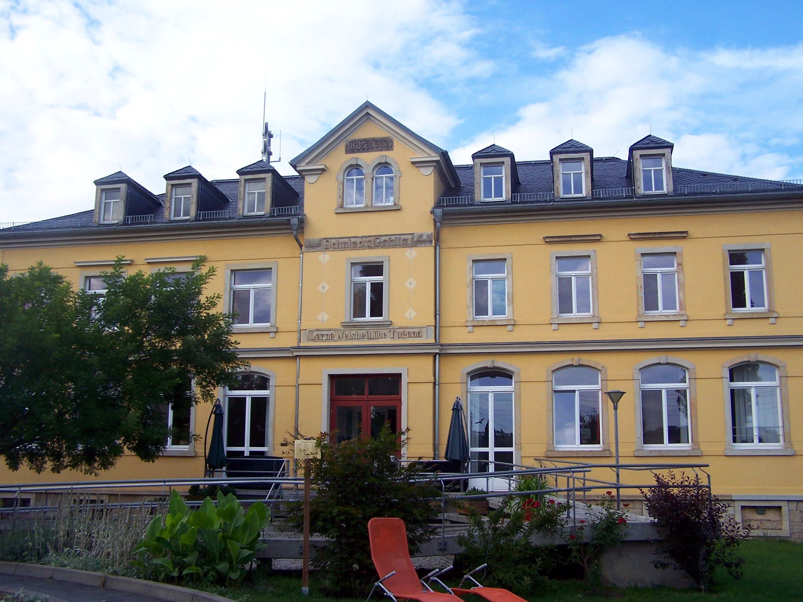 Schule zu Gohlis in Dresden-Gohlis, heute Freizeit- und Ferienhaus eines Wohnhofs in Trägerschaft der Lebenshilfe Dresden